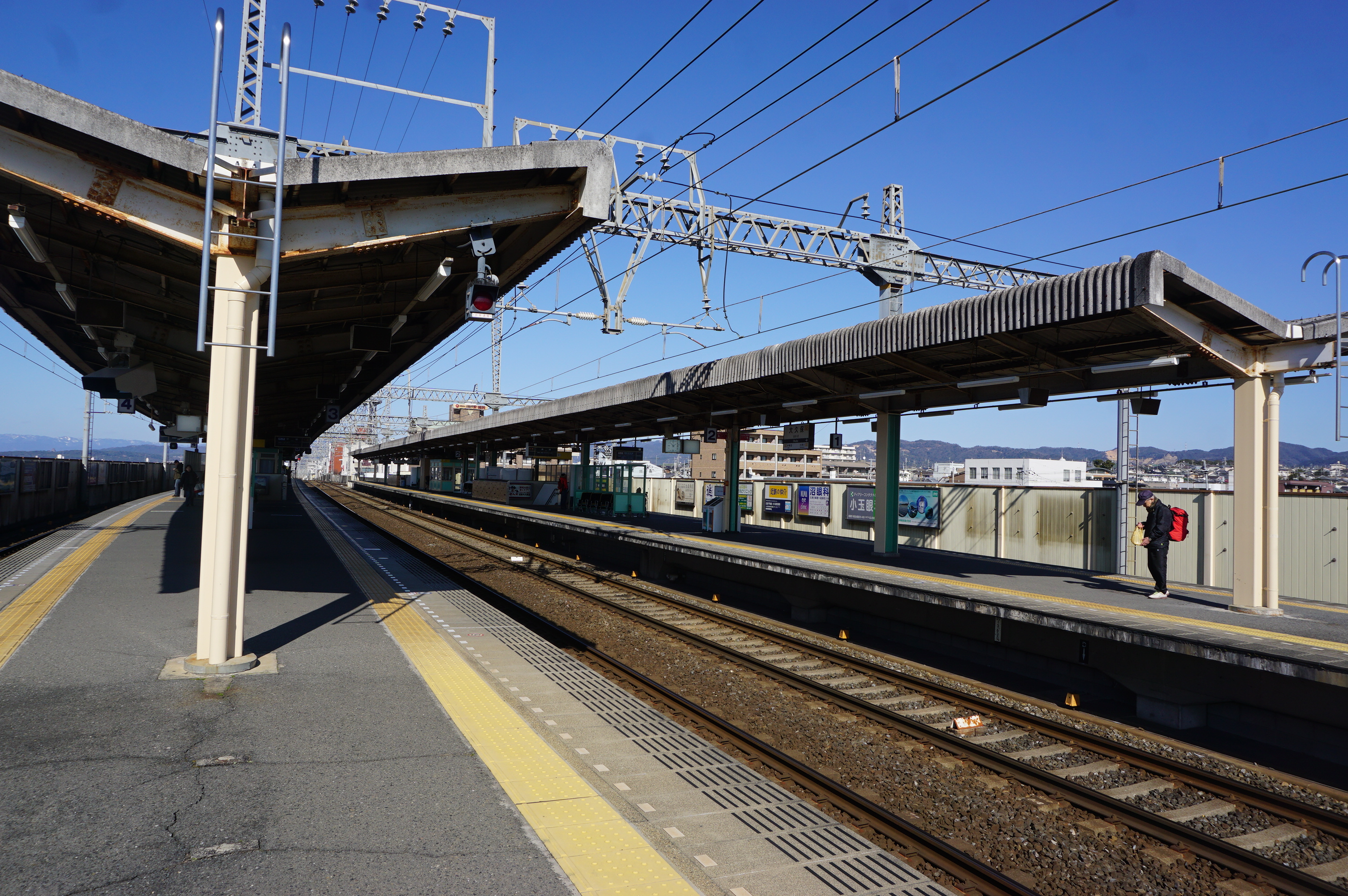 近鉄京都線・大 (おお)久保 (くぼ)駅のプラットホーム（2020年2月撮影） Sony ILCE-6000